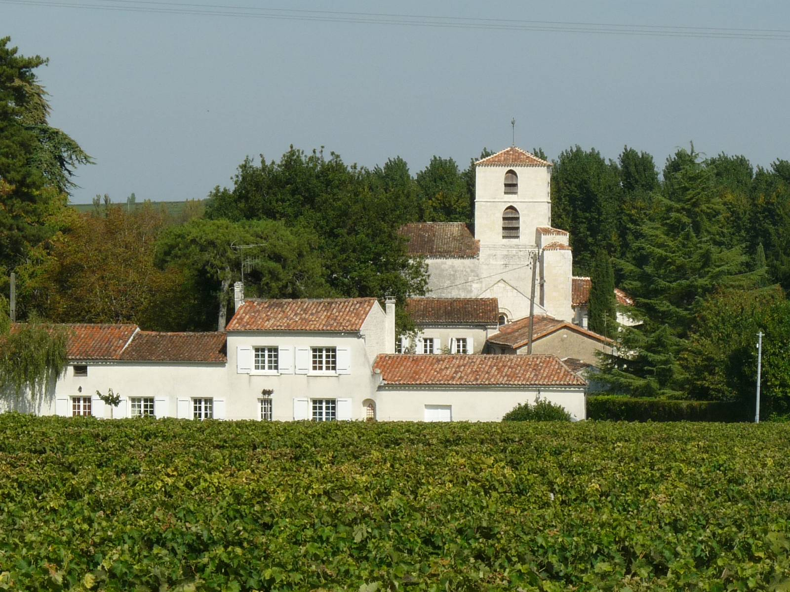 vue de Bourg-Charente (16), France